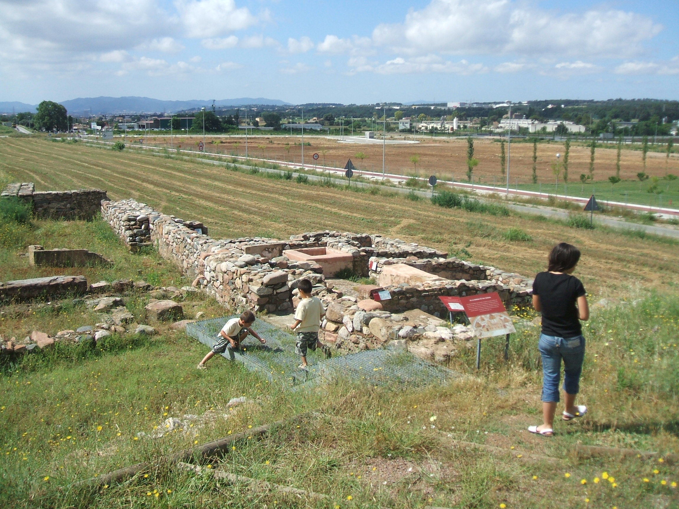 Vista de la part excavada de la Vil·la romana de Can Terrers, a la Garriga (Valles Oriental)